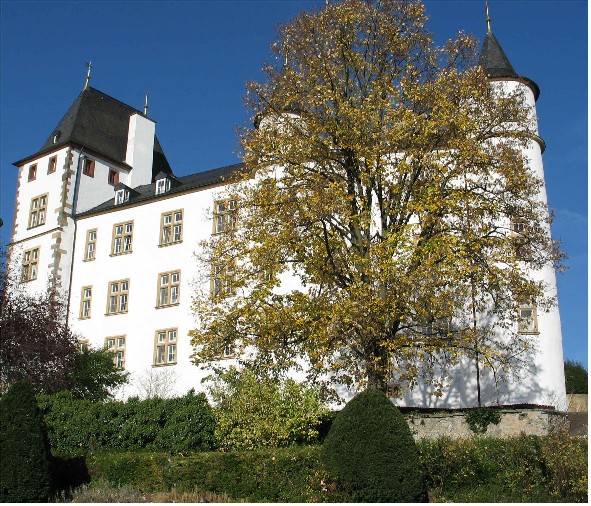 D'Schlass vun Nennig (Däitschland).